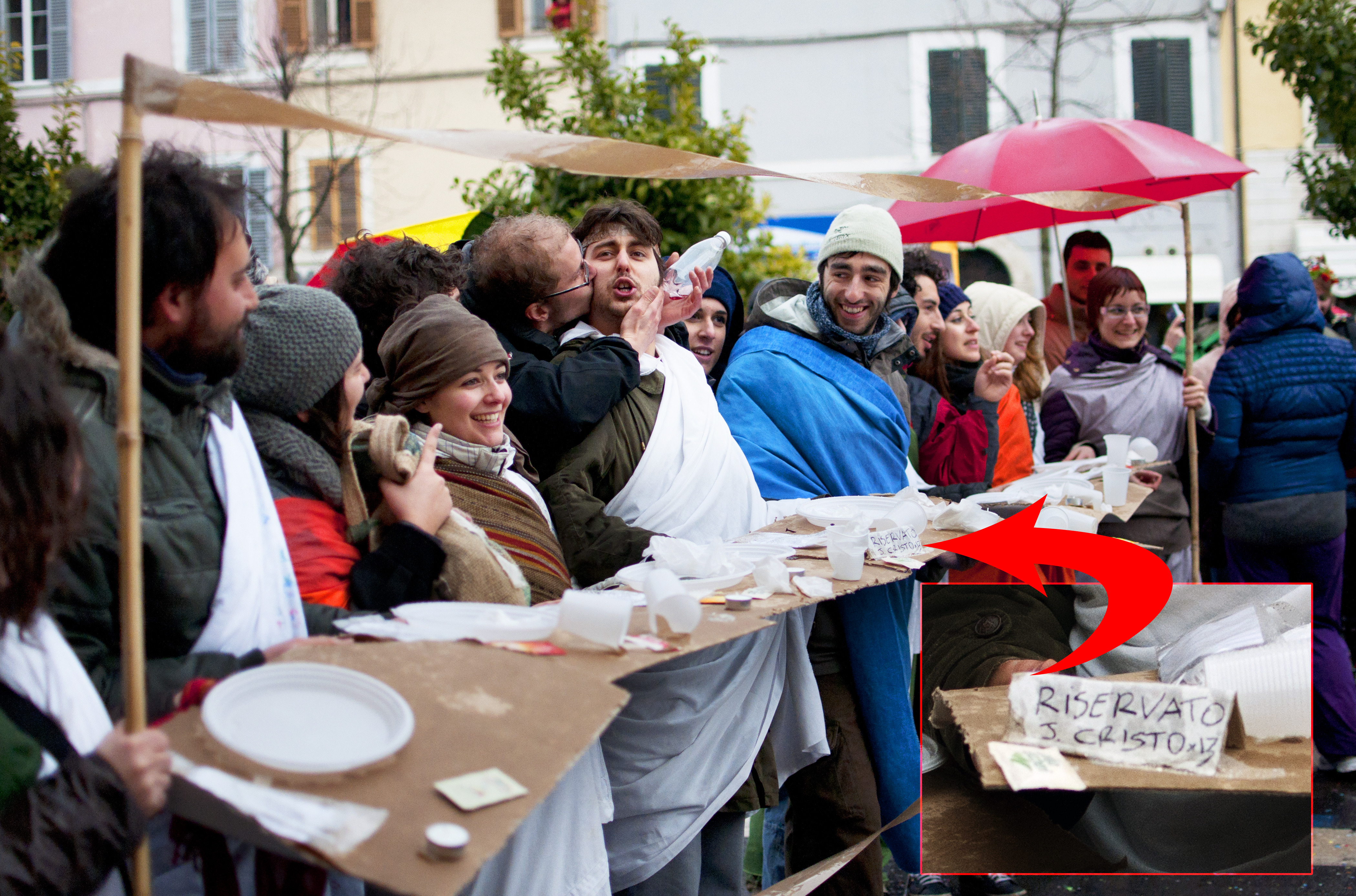 Carnevalone Liberato di Poggio Mirteto (Rieti), 13 marzo 2011